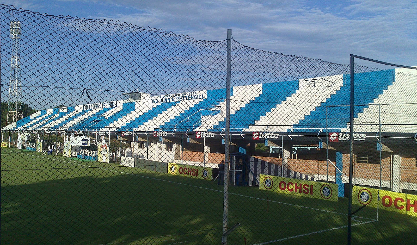 Graderias este del estadio Juan C. Pettengill (llamado actualmente Luis Salinas, del club 12 de Octubre de Itauguá. Paaraguay.